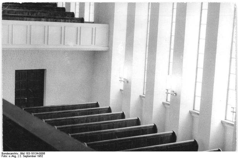 Erfurt, Synagoge, Innenansicht Zentralbild TBD-2.9.52 Die erste neu erbaute Synagoge. Das erste in der DDR neu erbaute jüdische Gotteshaus wurde am 31.8.1952 in einem Festakt in Erfurt eingeweiht. Die Synagoge wurde an derselben Stelle errichtet, wo in der Kristallnacht des 9. November 1938 faschistische Banden die alte Synagoge zerstörten. Die Regierung der DDR stellte für den Wiederaufbau des jüdischen Gotteshauses 290.000 DM zur Verfügung. UBz: Blick in das Innere der neuen Synagoge.